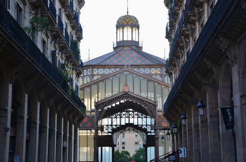 Mercat del Born (Barcelona)